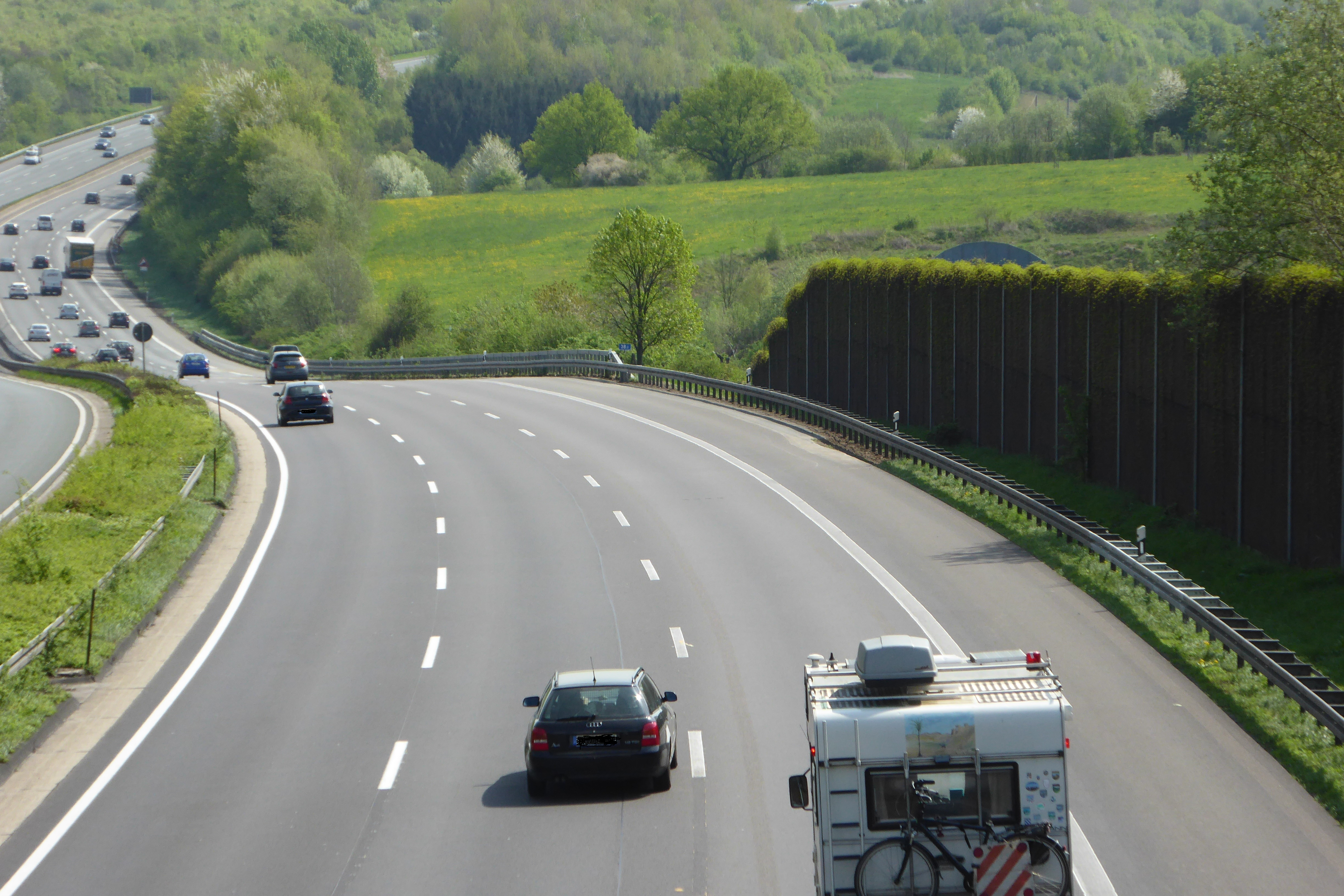 Blick von der Brücke Kochenbacher Str. in Aegidienberg auf den Ort des SEK-Zugriffs am Kilometer 38,0 an der Autobahn A3 in Richtung Frankfurt. Rechts hinter dem Ende der Lärmschutzmauer steht die zum Gedenken an Silke Bischoff gepflanzte Linde. Daneben sind die beiden Spitzen der Skulptur zu sehen.